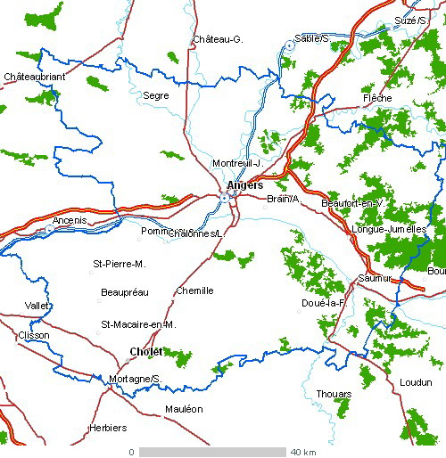 Carte du département Maine-et-Loire Légende